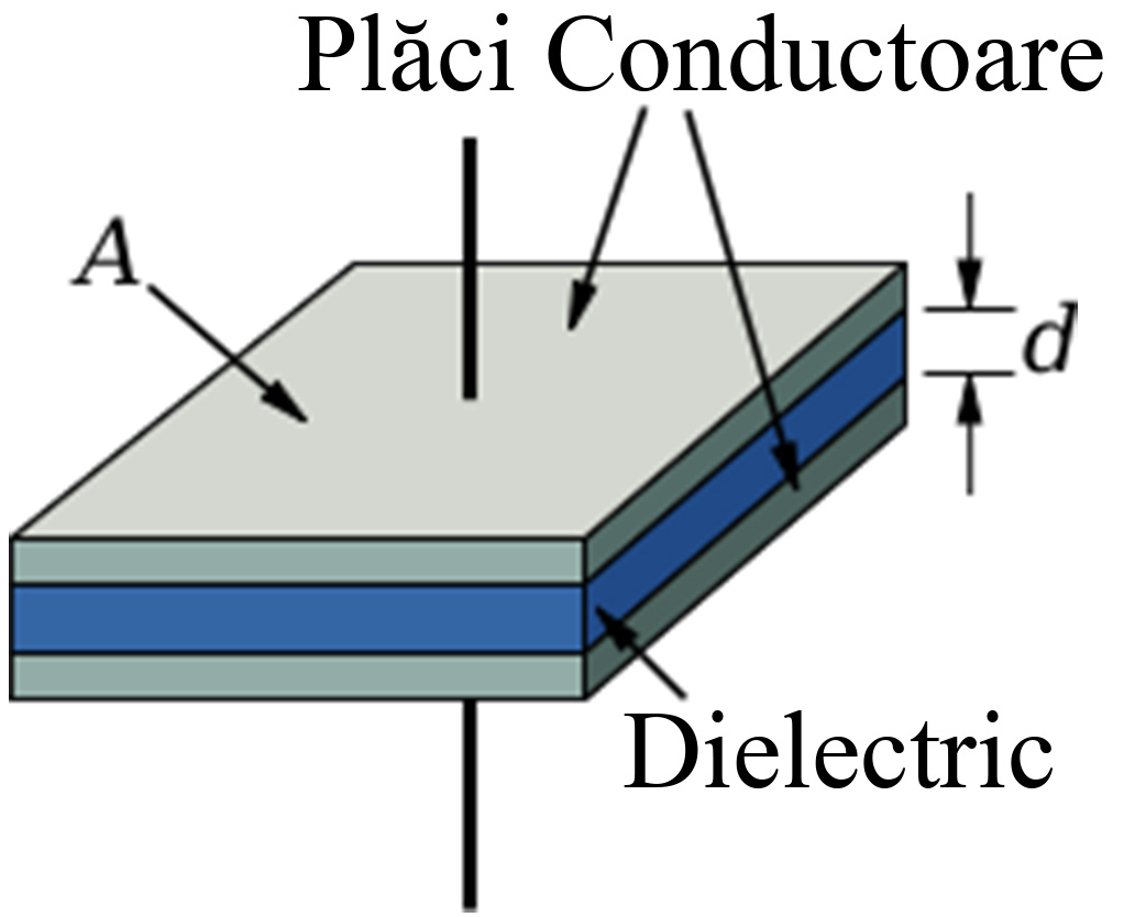 Condensator cu placi paralele